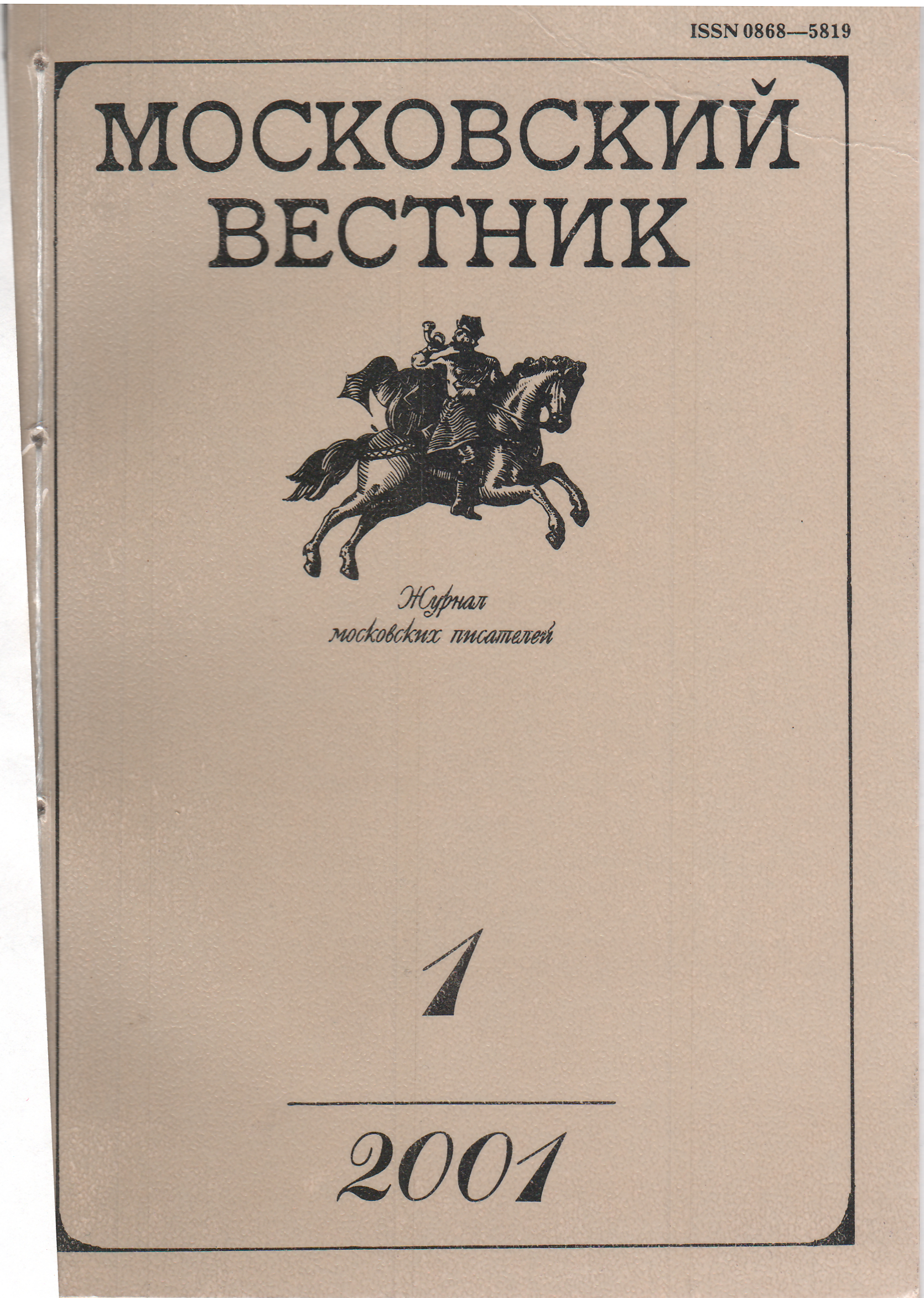 Повесть Андрея Белозёрова "Всегда сейчас, или Сублимация в сюжет", опубликованная в журнале "Московский вестник" 2001, №1